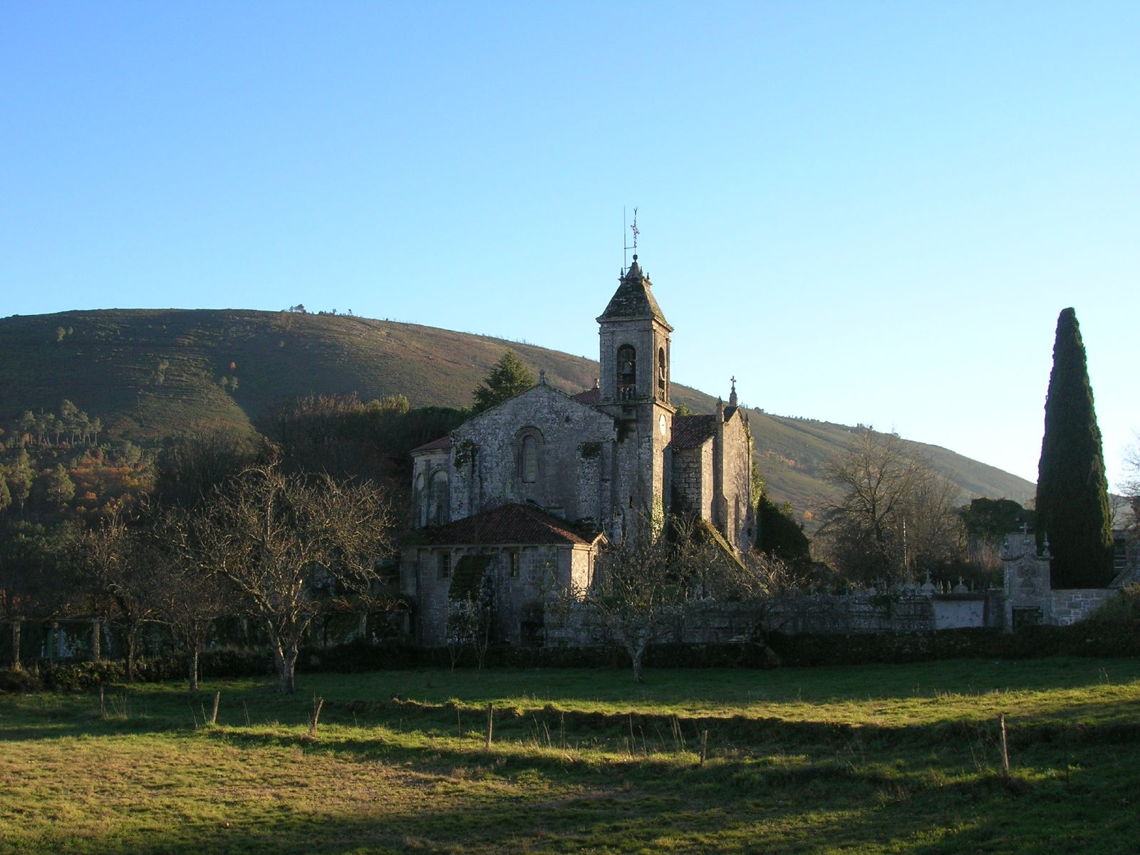 Mosteiro de Santa María de Melón, Melón, Galicia - Spain'Monasterio de Santa María de Melón'